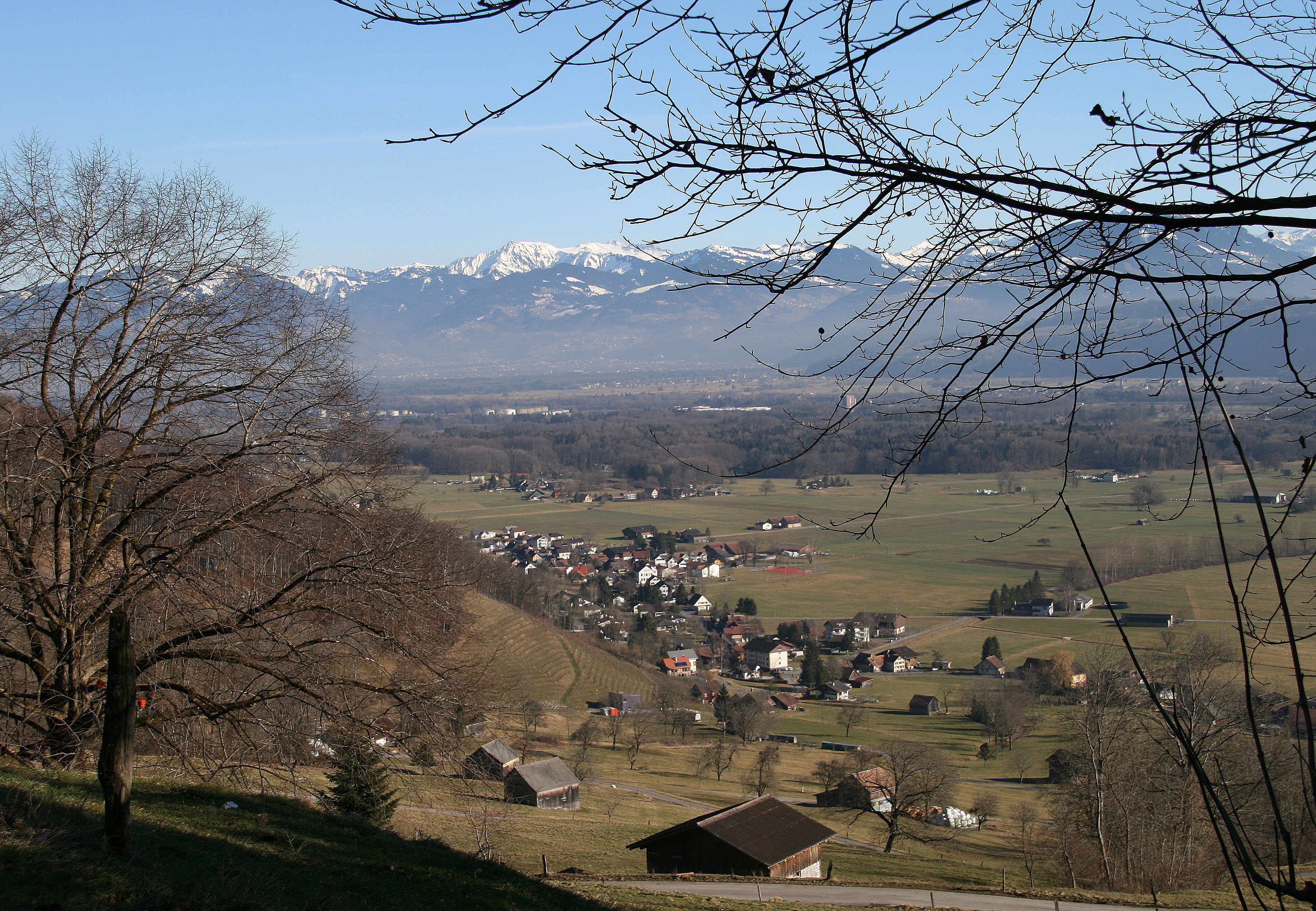 Blick vom "Trübliweg" auf Frümsen im Rheintal; Im Hintergrund der Hohe Freschen im Bregenzerwaldgebirge.